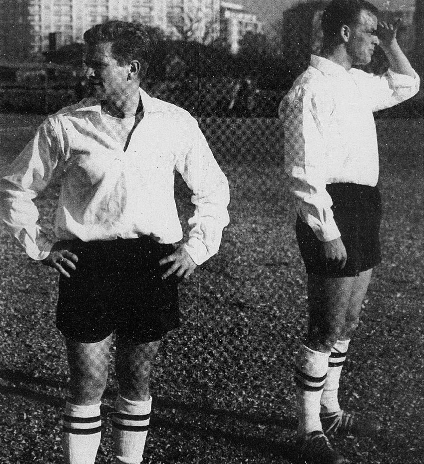 Il calciatore italiano Giampiero Boniperti (a sinistra) e il gallese John Charles (a destra) alla Juventus nella stagione 1957-58; nell'occasione i due giocatori indossano la seconda divisa dell'epoca del club, composta da maglia bianca, calzoncini neri e calzettoni bianchi.